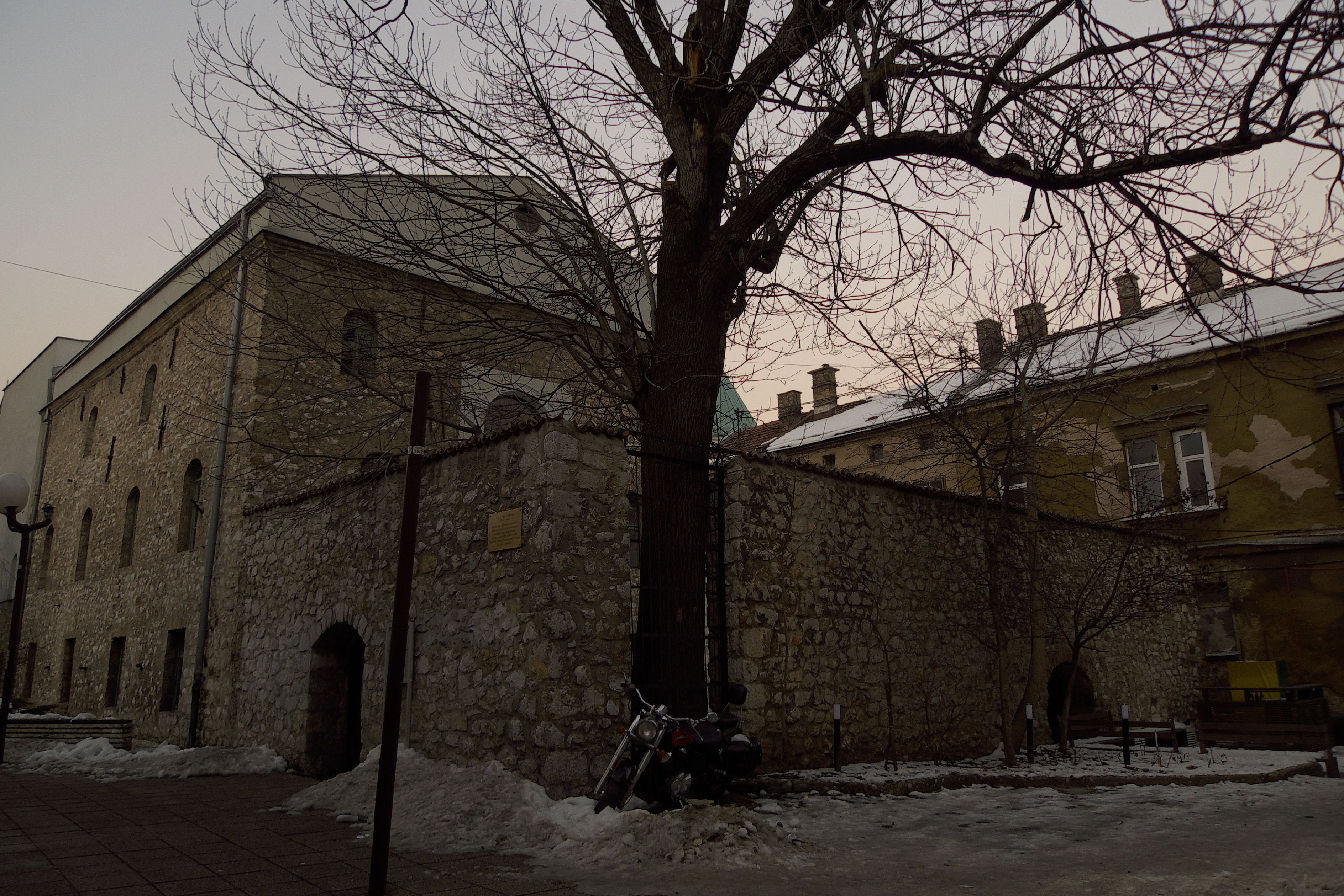 Bascarsija